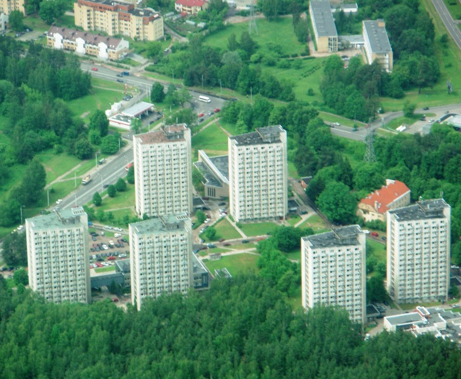 Saulėtekis. Vilnius